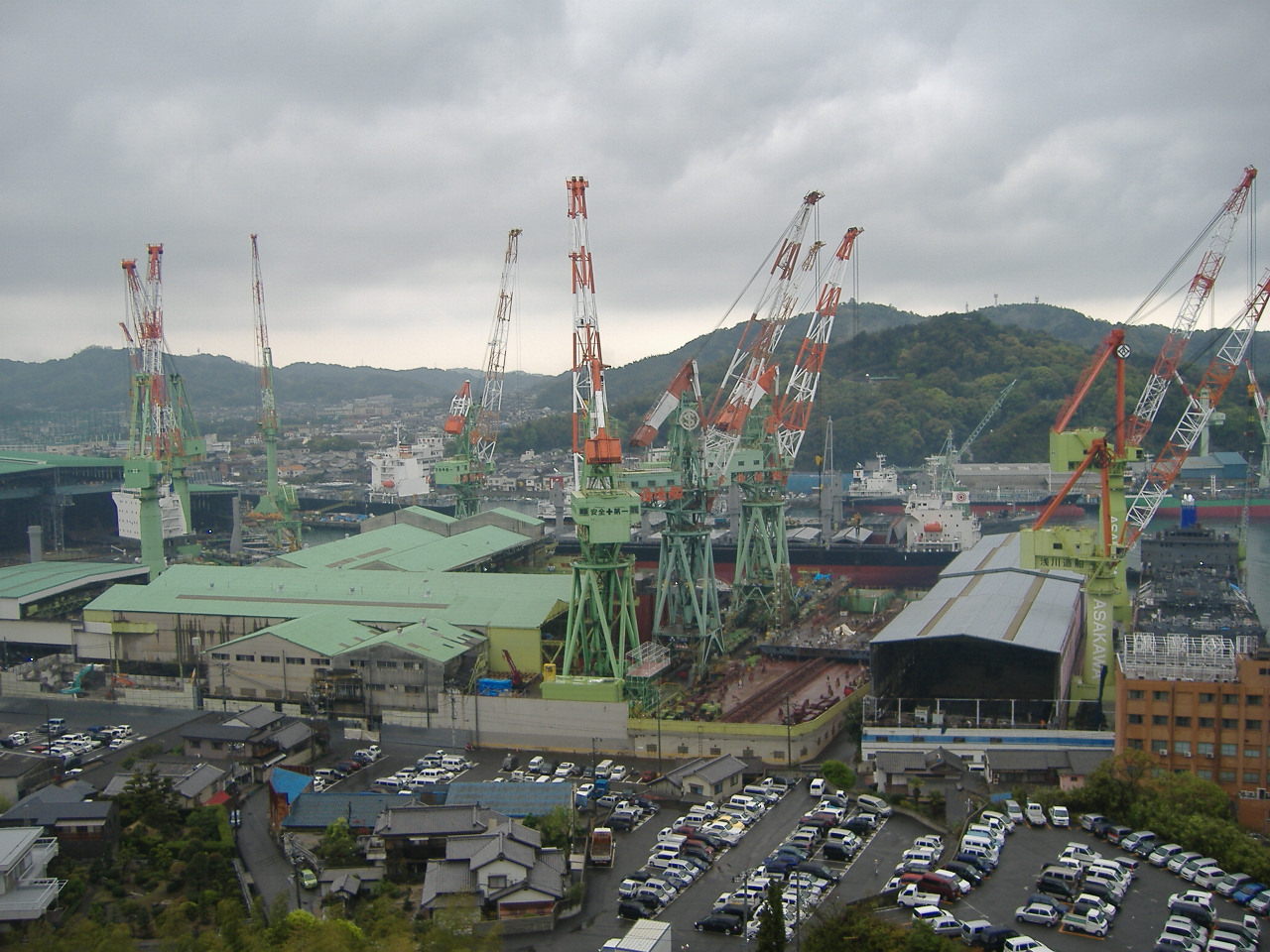 Astillero Imabari (Ehime, Japón)